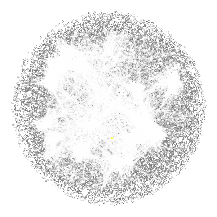 Pärmi geeni interaktsioonid (graaf)